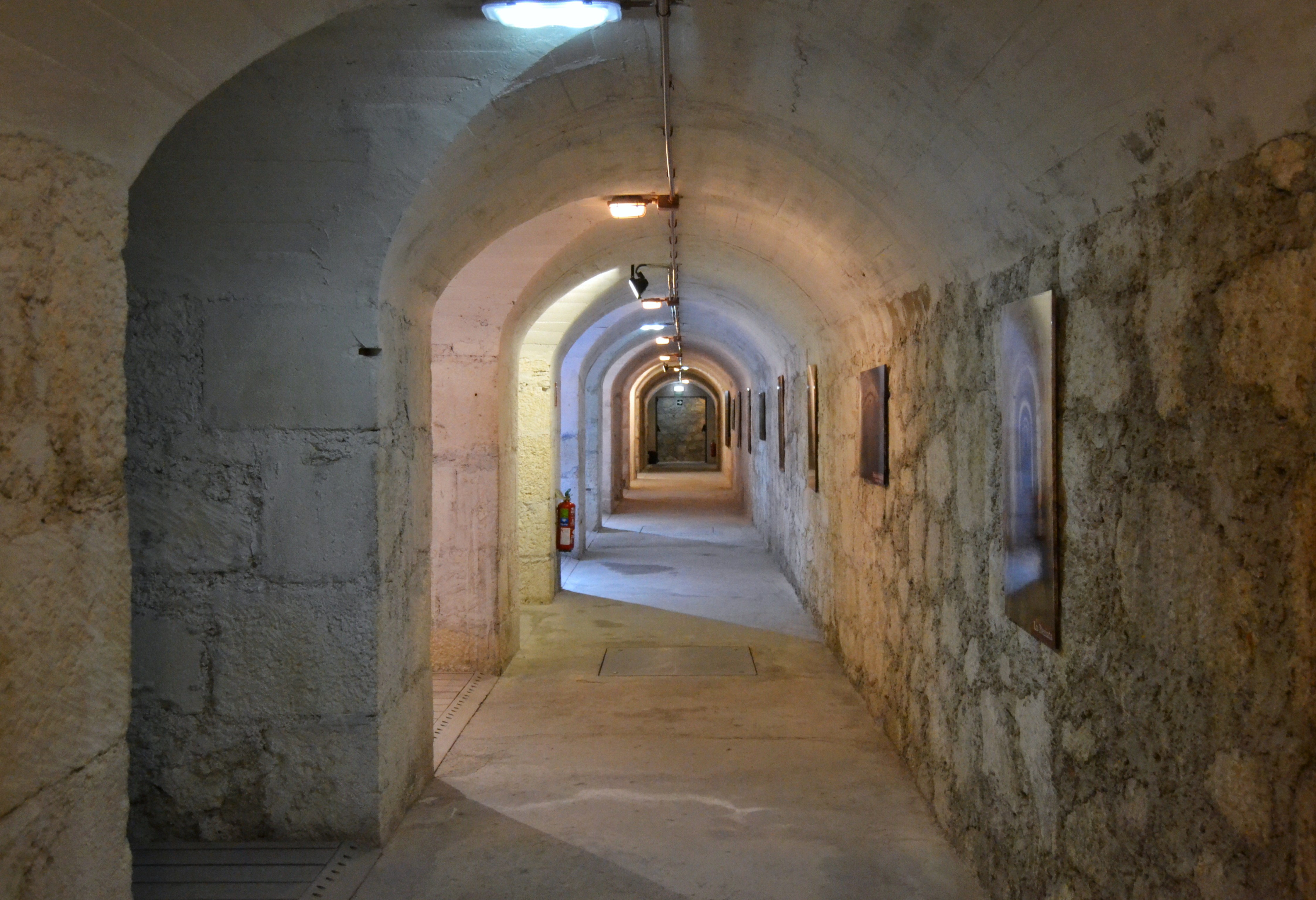 Alcoi, refugi de Cervantes.